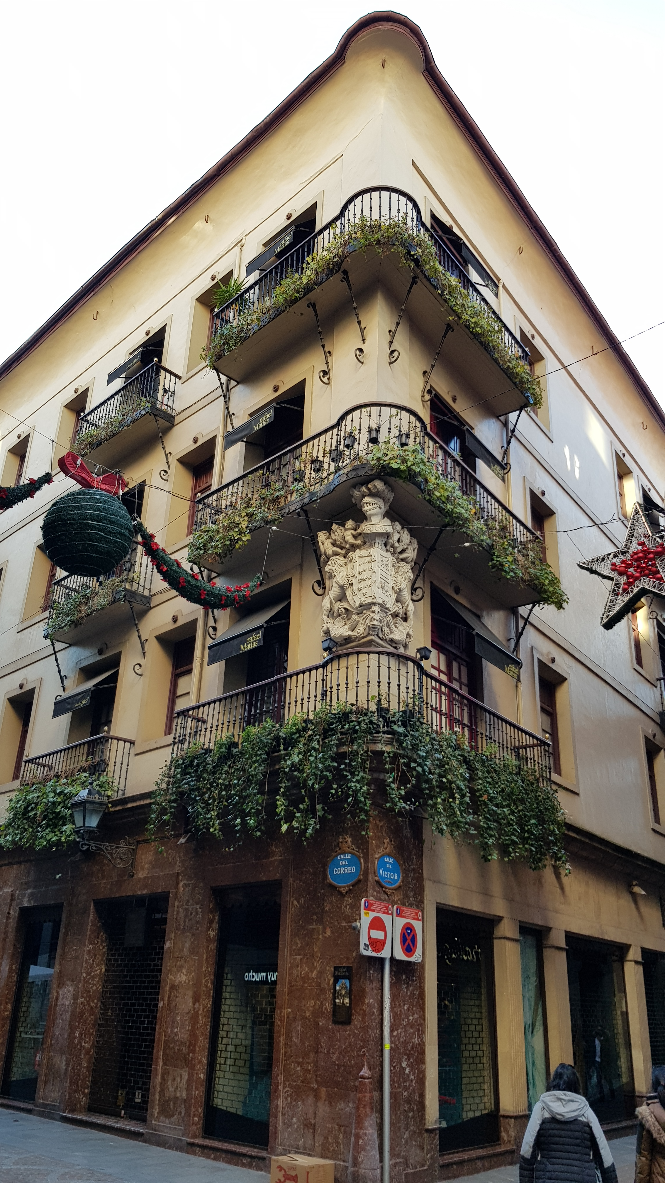 Allende Salazar jauregia